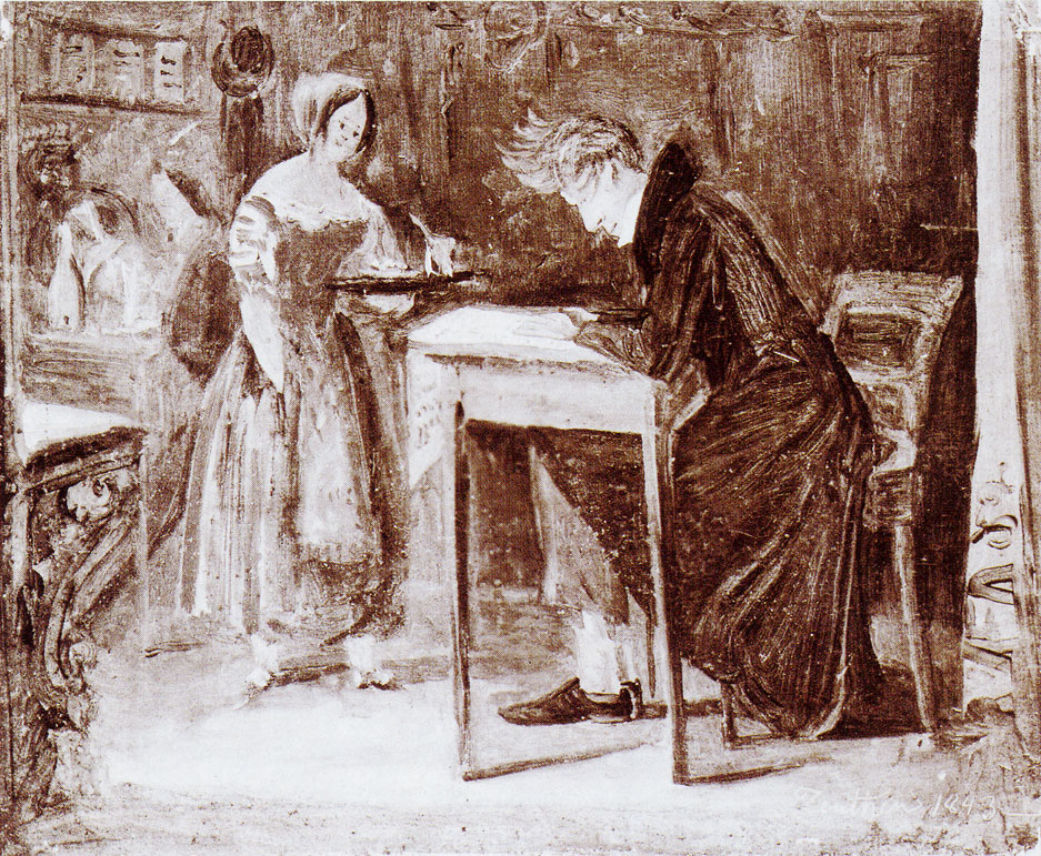 Sketch